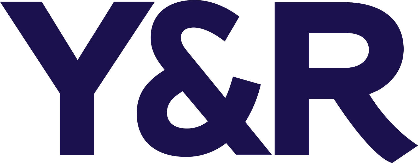 Logo da agência Y&R